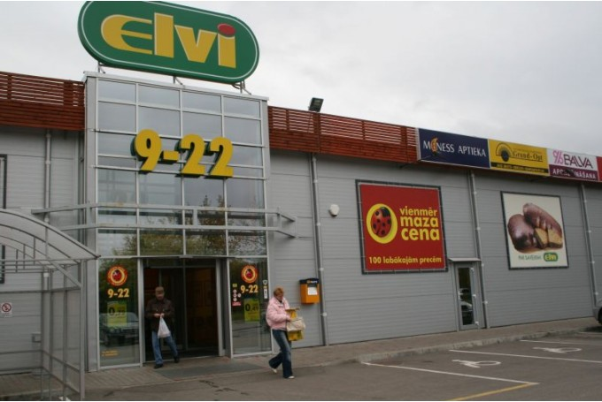 Elvi veikals Latvijā, Valkā